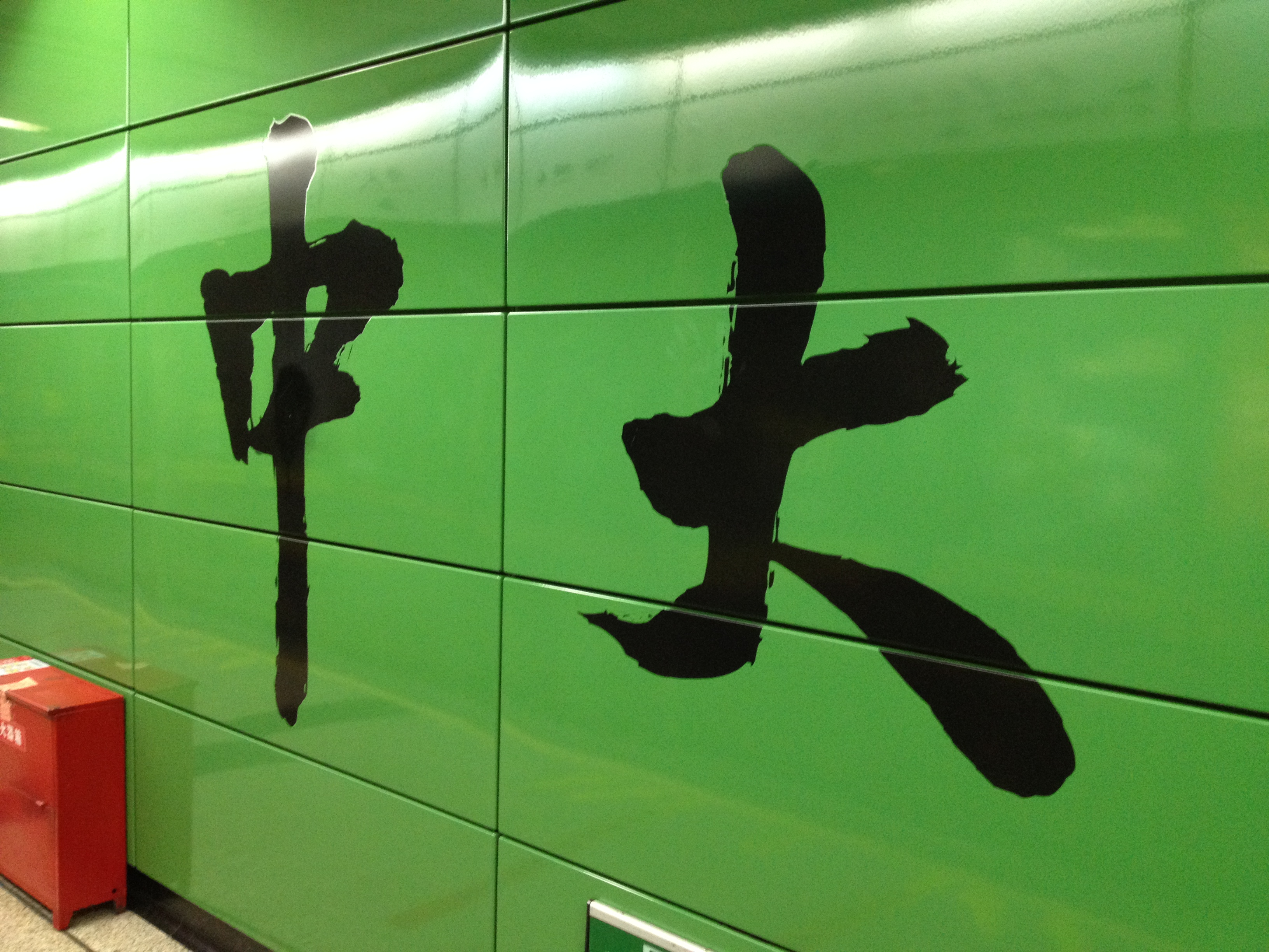 广州地铁中大站书法站名